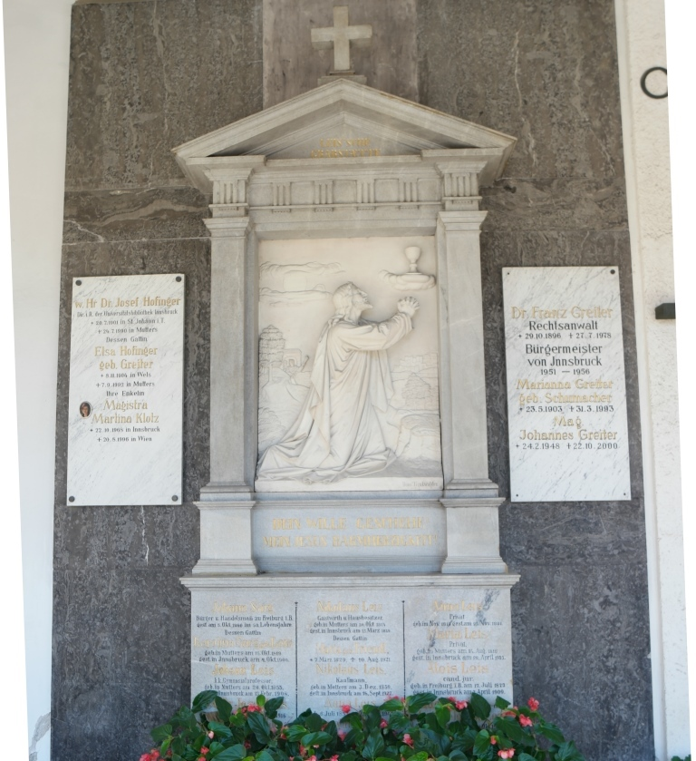 Friedhof Innsbruck-Wilten: Grabstätte Leis, Grab des Bibliothekars Josef Hofinger (1901-1990), Ehrengrab von Bürgermesiter Franz Greiter (1896-1978)